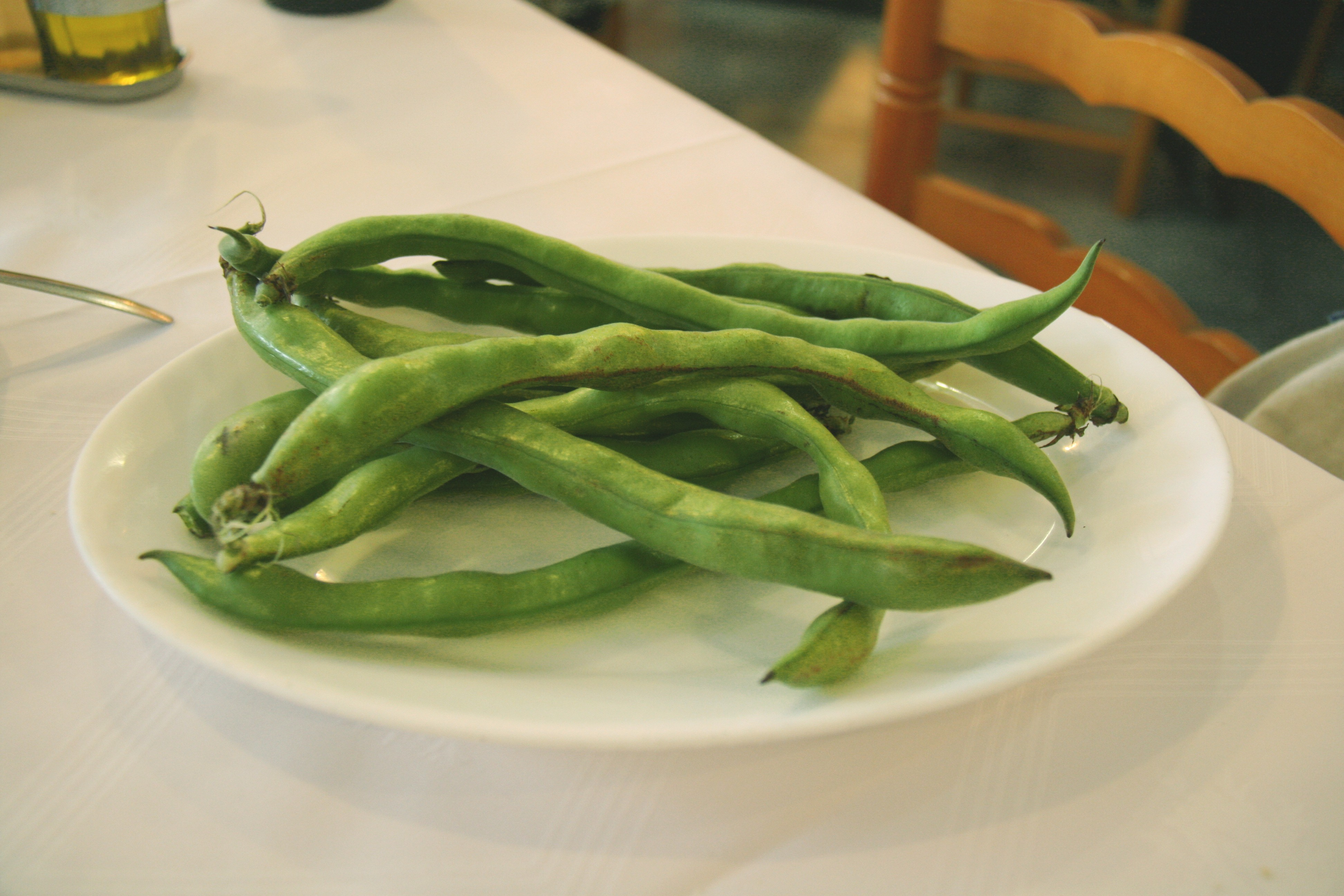 Habas